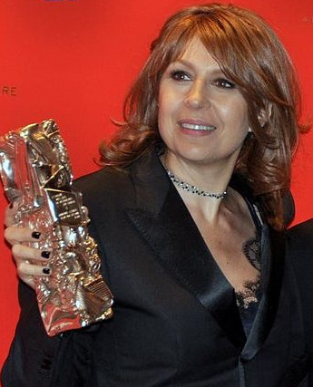 Валері Бенґіґі на церемонії Сезара, 2013